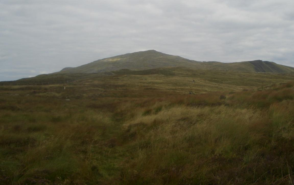 waun camddwr